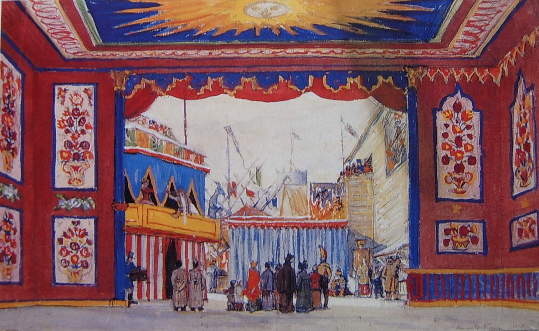 Бенуа Александр Николаевич. Комната Черномора. Эскиз декорации к «Петрушке» И.Стравинского. 1911